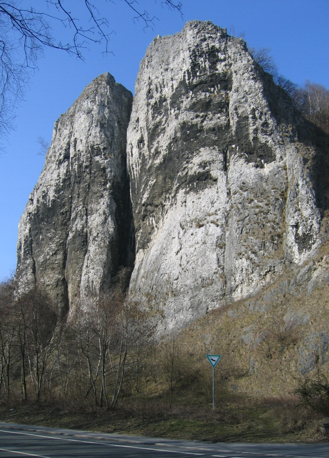 Description: Massenkalk-Klippen "Pater und Nonne" im Tal der Lenne an der Bundesstraße 7 in Iserlohn-Letmathe, Naturdenkmal. Source: selbst fotografiert Date: 19. März 2006 Author: Asio otus